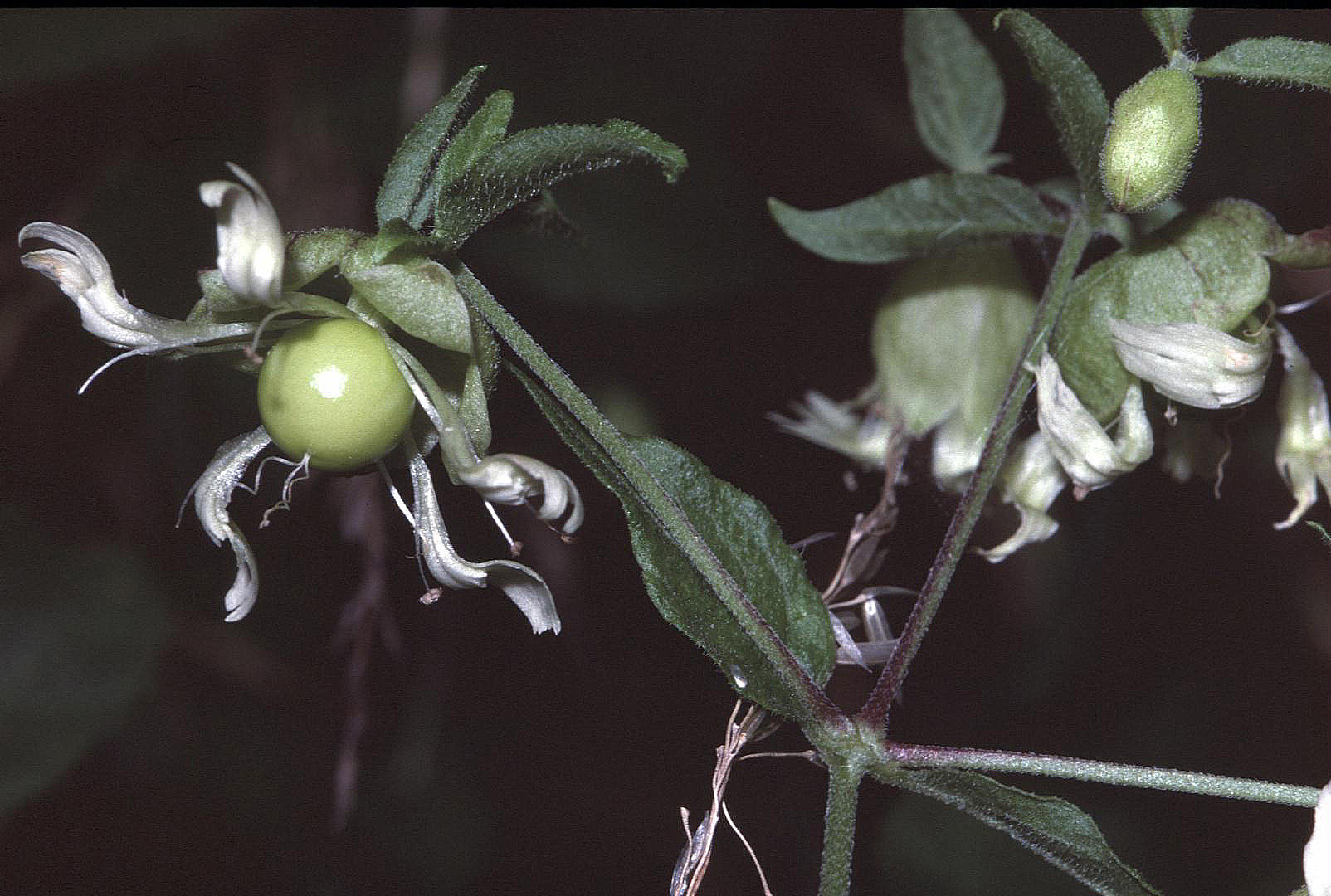 Cucubalus baccifer in Unterfranken